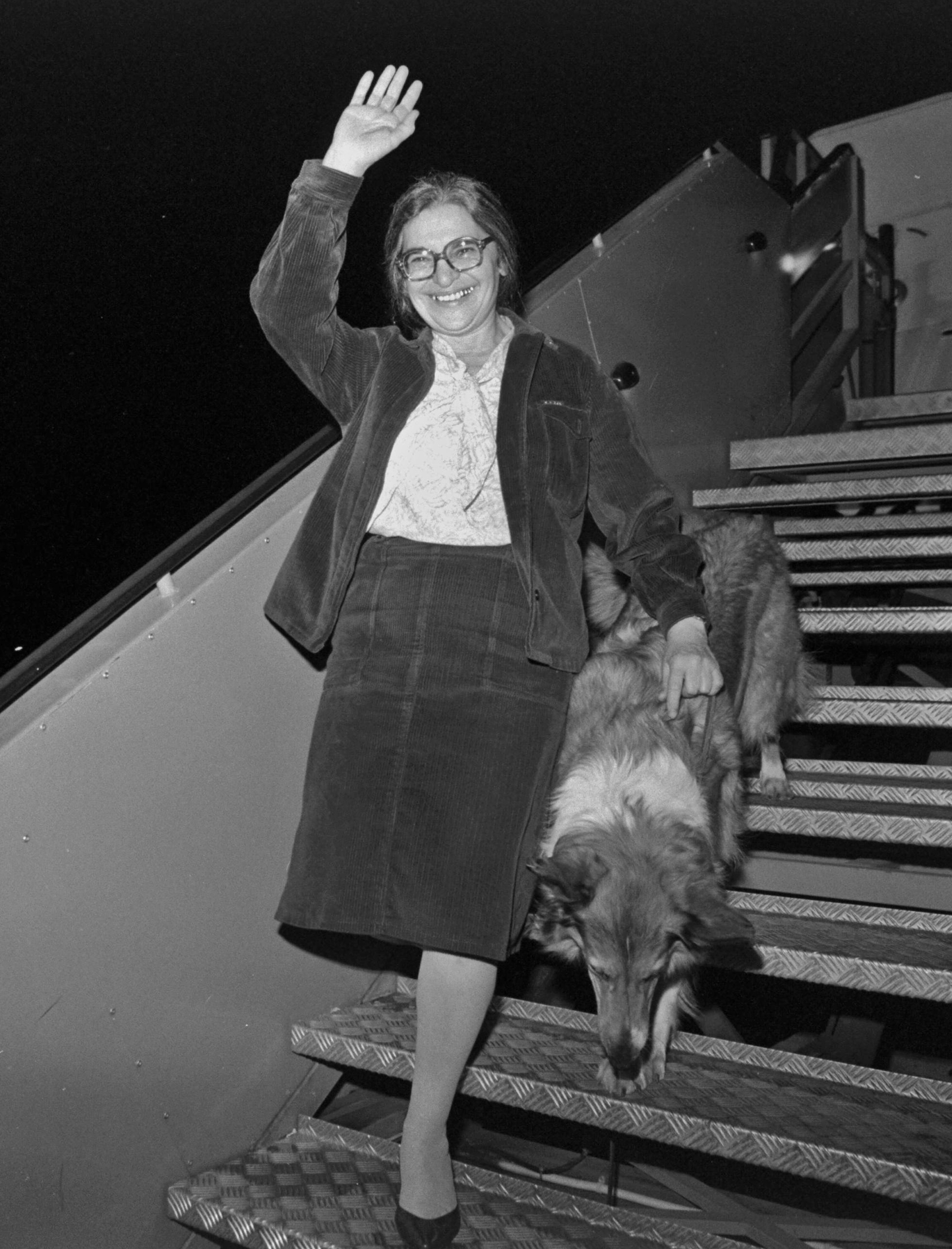 Prisoner of Zion Ida Nudel and her faithful dog arrive on a private Boeing Jet, owned by American oil billionaire Armand Hammer, at Ben-Gurion Airport. אסירת ציון, אידה נודל, מגיעה ארצה במטוס פרטי בבעלותו של איל הנפט האמריקאי, ארמנד המר